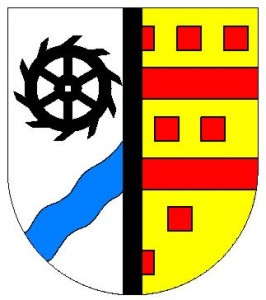 Wappen von Dambach (bei Birkenfeld)